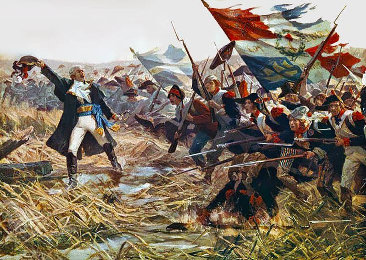 Bataille de Jemmapes 1792